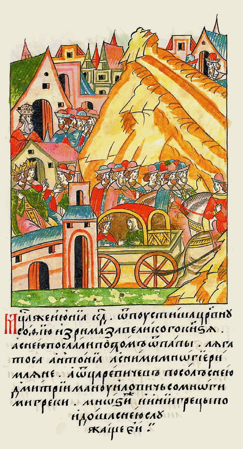 Миниатюра «Приезд Софьи Палеолог в Москву»: "Месяца же июня в 24 день отпустили царевну Софью из Рима за ве- ликого князя; а с нею послали послом от папы легата Антония, а с ним и многие римляне; а от царе- вичей посол с нею — Дмитрий Мануилович со многими греками; многие же и другие греки пошли с нею, чтобы служить ей." (16 в., Лицевой летописный свод, Российская национальная библиотека, Санкт-Петербург) 24 июня 1472 г. Софья Палеолог с многочисленной свитой и в сопровождении папского легата отправилась в путь из Италии в Великое княжество Московское. Обоз пересек всю Европу, направляясь сначала на север Германии, в Любек. Немецкие хроники подробно описывают его передвижение и торжественные встречи в разных городах. В честь высокой гостьи устраивались балы и рыцарские турниры; в Нюрнберге горожанки подарили Софье двадцать коробок конфет. Только 1 сентября «фрязы и греки из Рима» прибыли с царевною Софьей в Любек. Далее предстояло долгое путешествие по морю: как отметили летописи, «носило их море 11 день». 21 сентября корабль прибыл в Колывань (современный Таллин). 1 октября процессия двинулась в Москву. Через пять дней добрались до Юрьева (ныне Тарту), 11 октября состоялся торжественный въезд во Псков. Здесь остановились на неделю, и еще столько же занял путь до Новгорода. Все время во главе огромного обоза ехал папский легат с большим католическим крестом, вызывая неудовольствие церковных властей. И вот 12 февраля 1472 года кортеж невесты Ивана III остановили в пятнадцати верстах от Москвы. Боярину Федору Хромому было приказано любым способом заставить папского легата Антонио убрать крест, так сильно раздражавший людей. Боярин действовал решительно – просто отнял крест у папского посланника. И 12 ноября, в четверг, Софья Палеолог въехала в Москву. Свадьба состоялась в тот же день. Один из летописных сводов отметил, что обряд в Успенском соборе совершал не митрополит Филипп, который никак не мог простить крест, а коломенский «протопоп Осей».